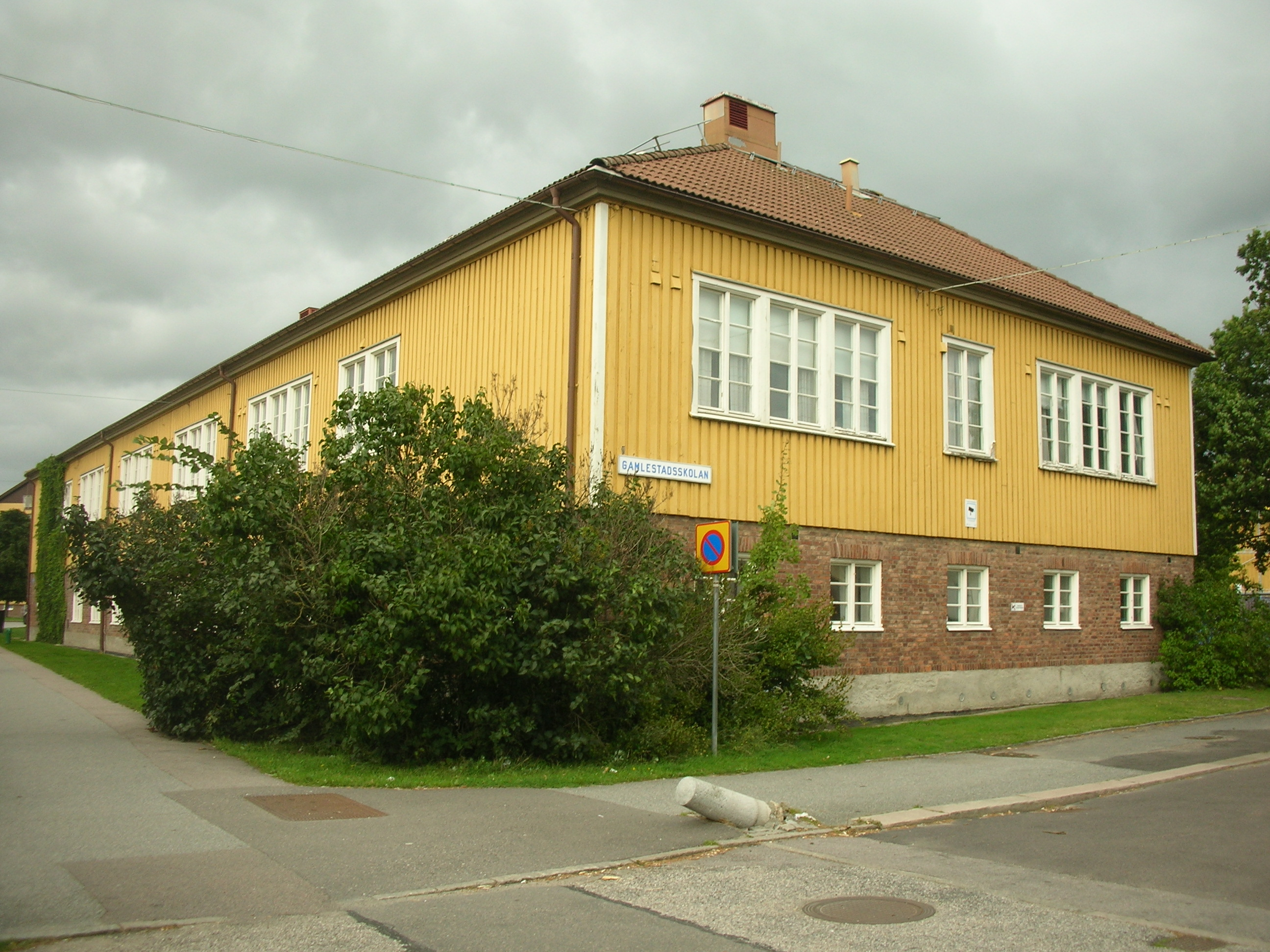 Den gamla delen av Gamlestadsskolan i Göteborg som från början kallades Lödöseskolan.